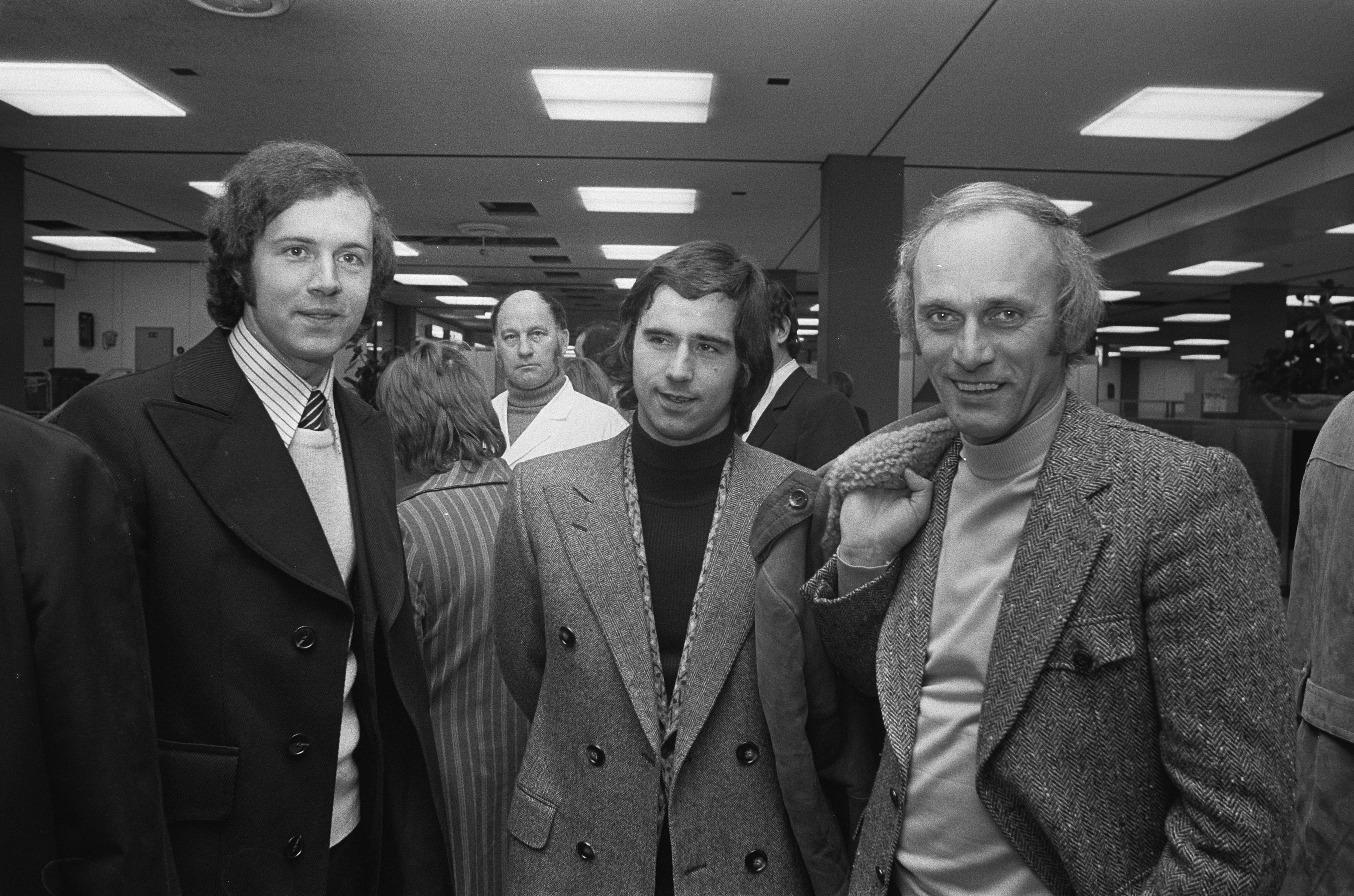 Franz Beckenbauer, Gerd Müller en Udo Lattek bij aankomst op Schiphol voor de wedstrijd Ajax - Bayern München